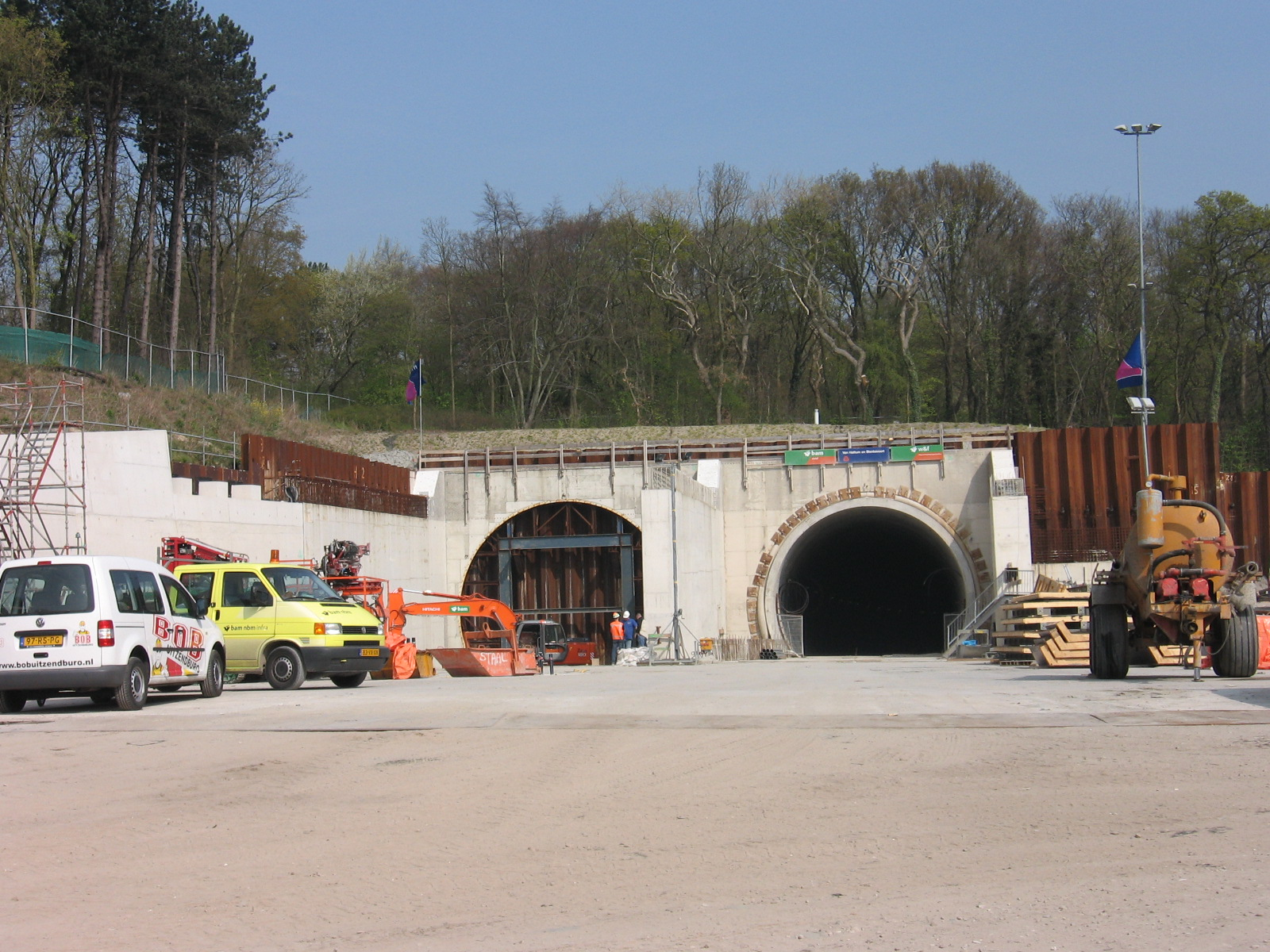 Hubertustunnel, in aanbouw.